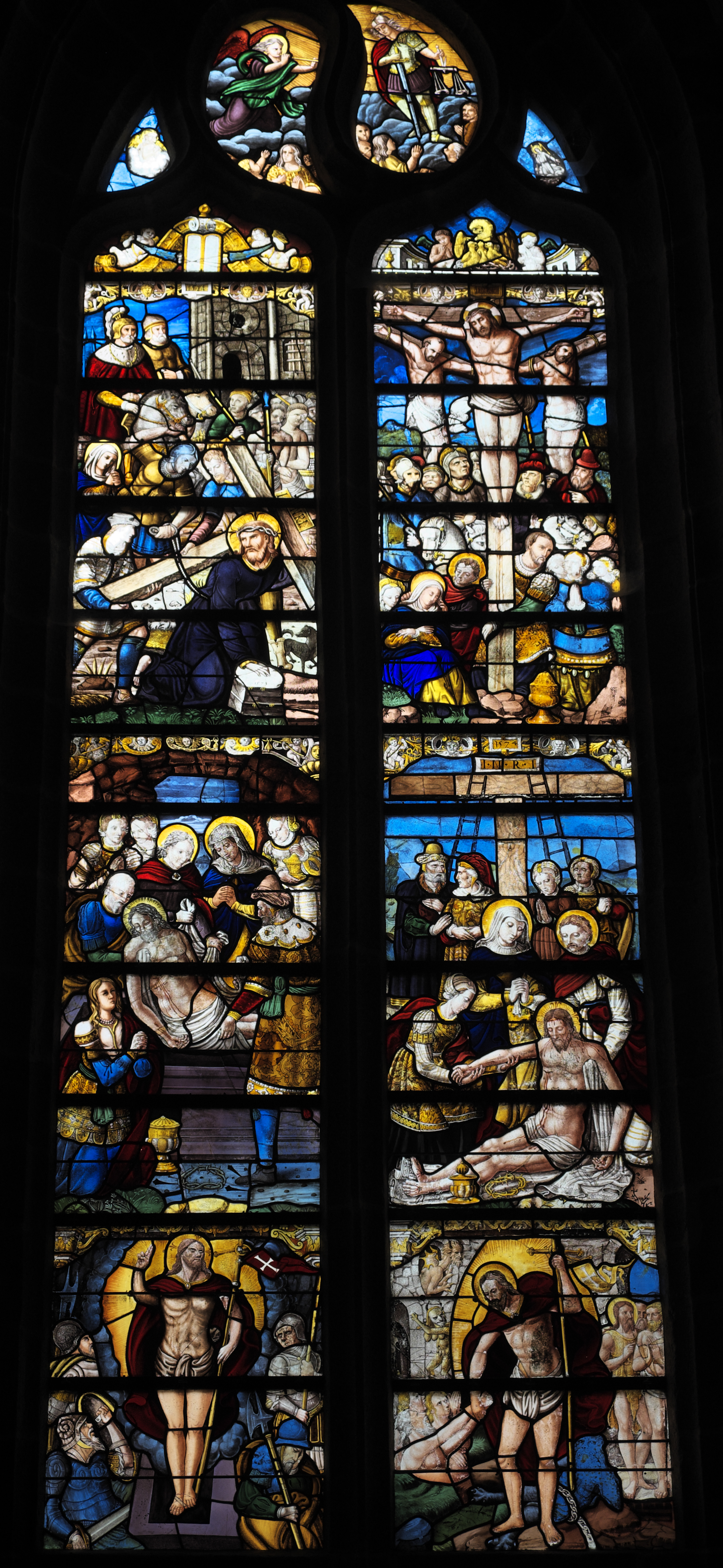 Katholische Pfarrkirche Saint-Pierre-Saint-Paul in Bazouges-la-Pérouse im Département Ille-et-Vilaine (Region Bretagne/Frankreich), Passionsfenster (baie 16) von 1573